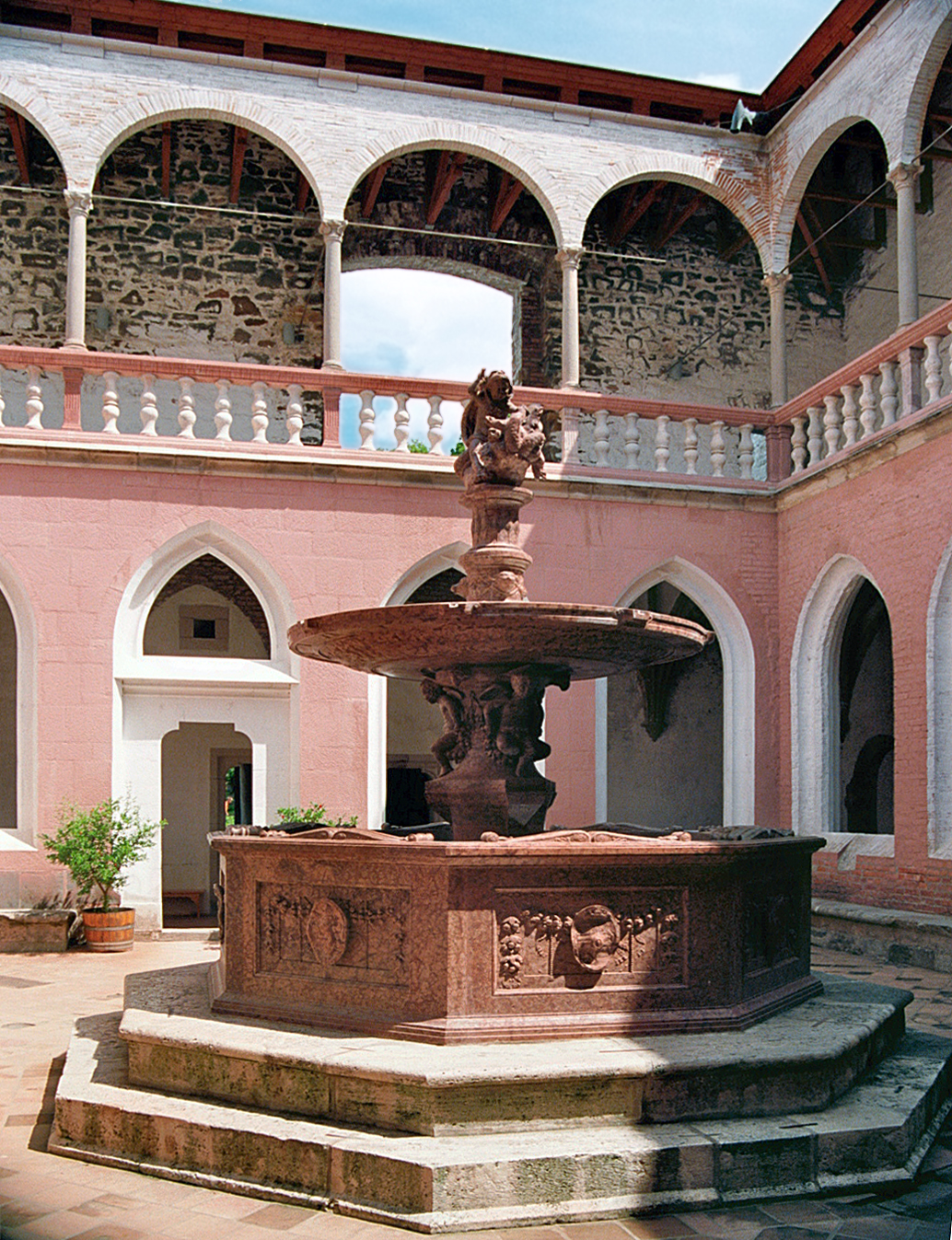 Zentraler Innenhof mit dem nach Originalbefunden rekonstruierten Renaissancebrunnen im Königsschloß zu Visegrád, Ungarn.